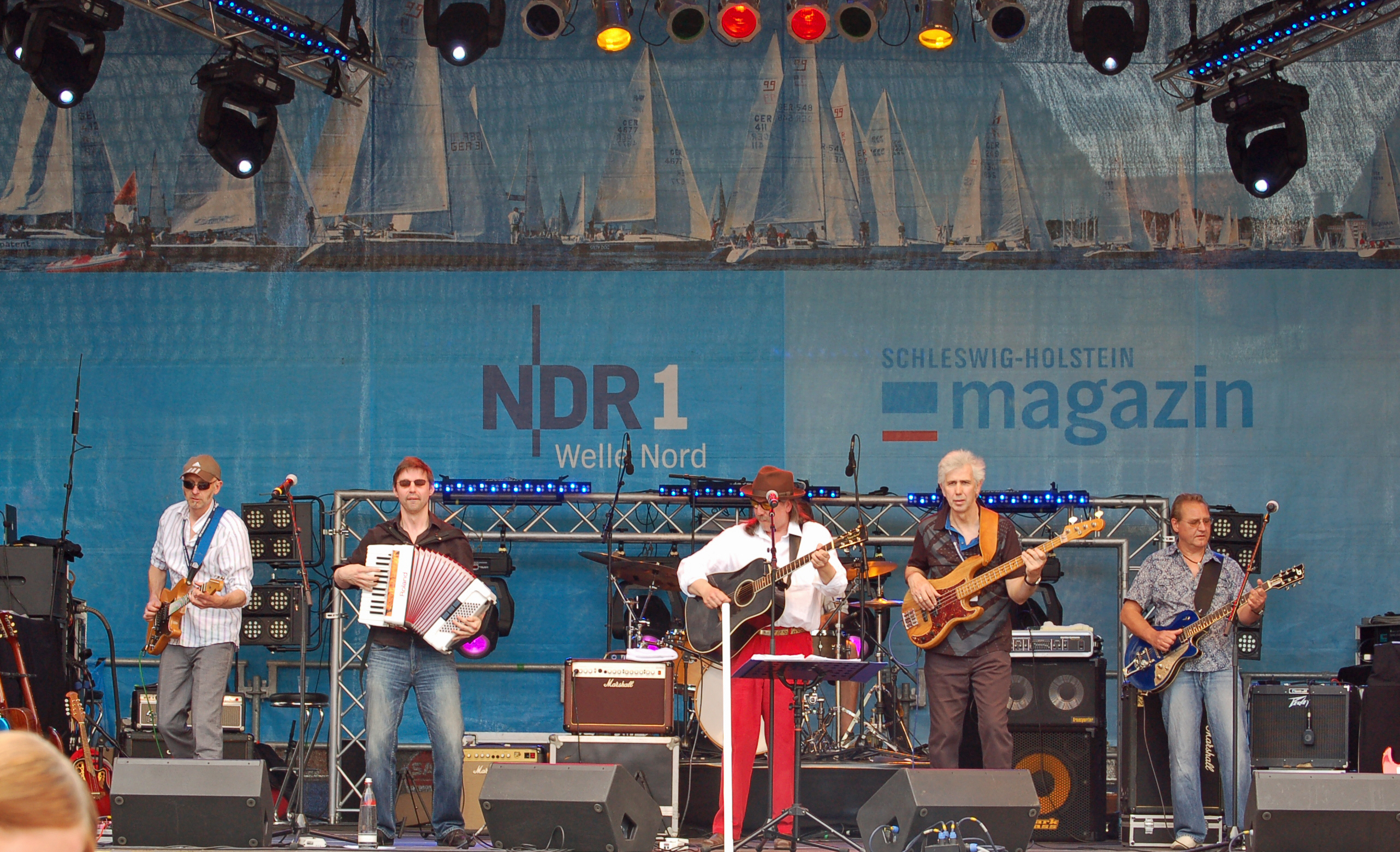 Charly Beutin & die Schreckschuss Band beim Schleswig-Holstein-Tag 2010 in Rendsburg